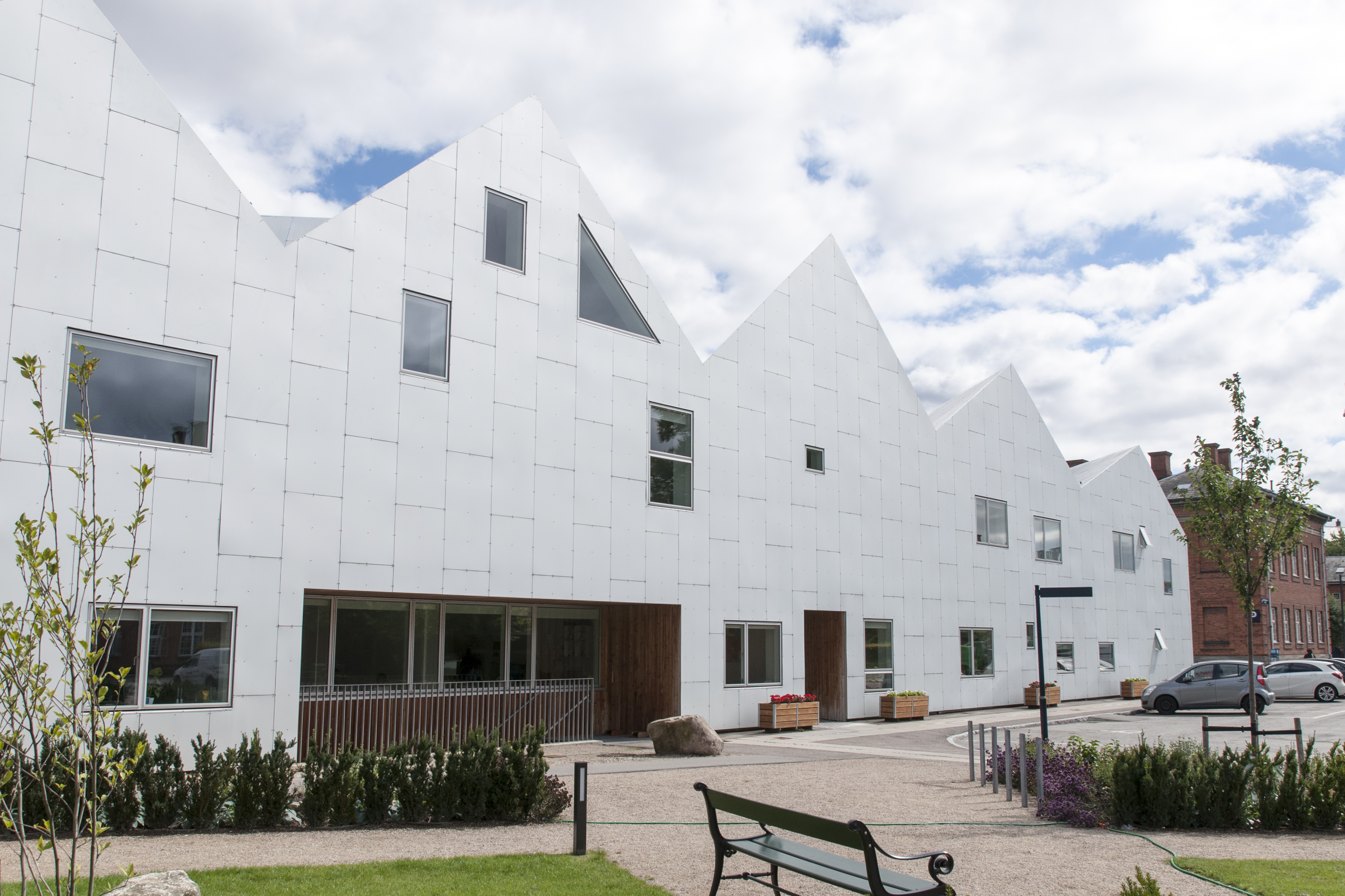 Cancer centre at Nørre Allé in Copenhagen, Denmark